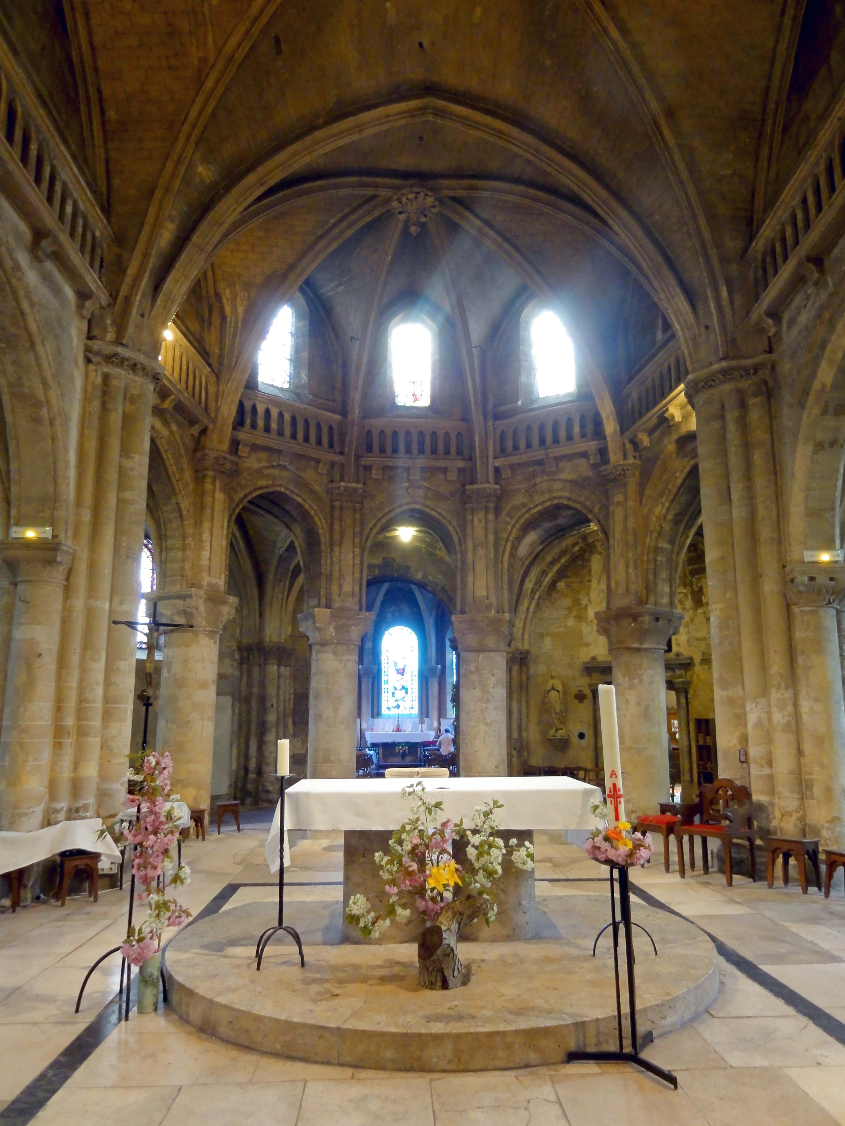 Intérieur de l'église - voir titre.